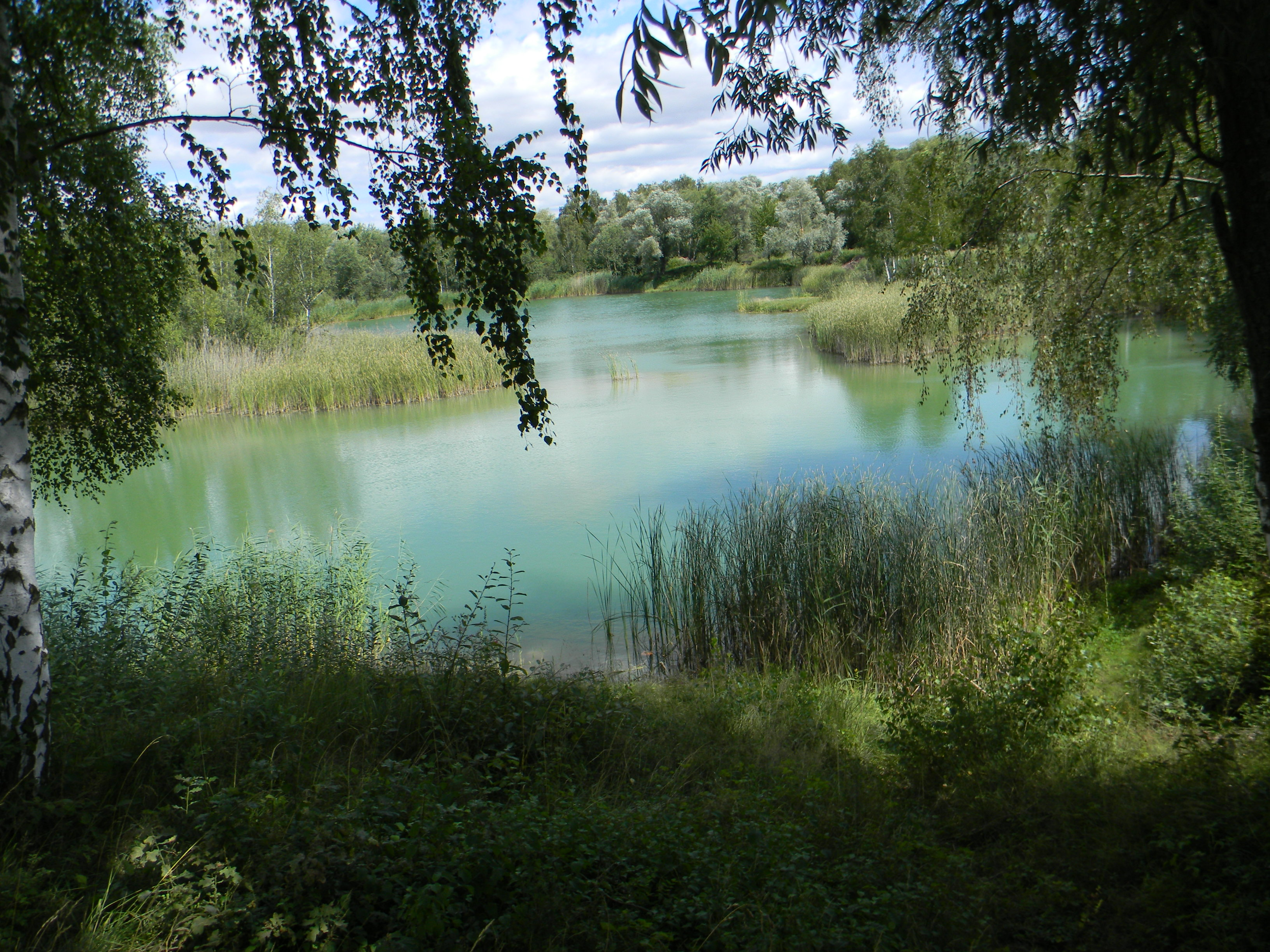 Blick über einen Weiher in der Erdekaut